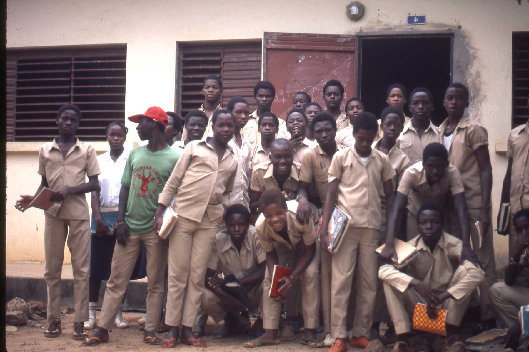 Elèves du lycée de Boundiali, au nord de la Cote d'Ivoire